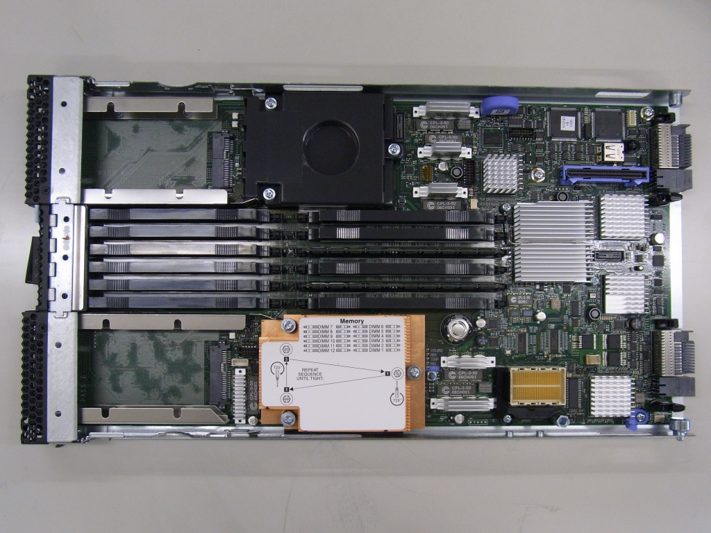 IBM_BLADECENTER_HS22_7870_JPN_JPY.jpg